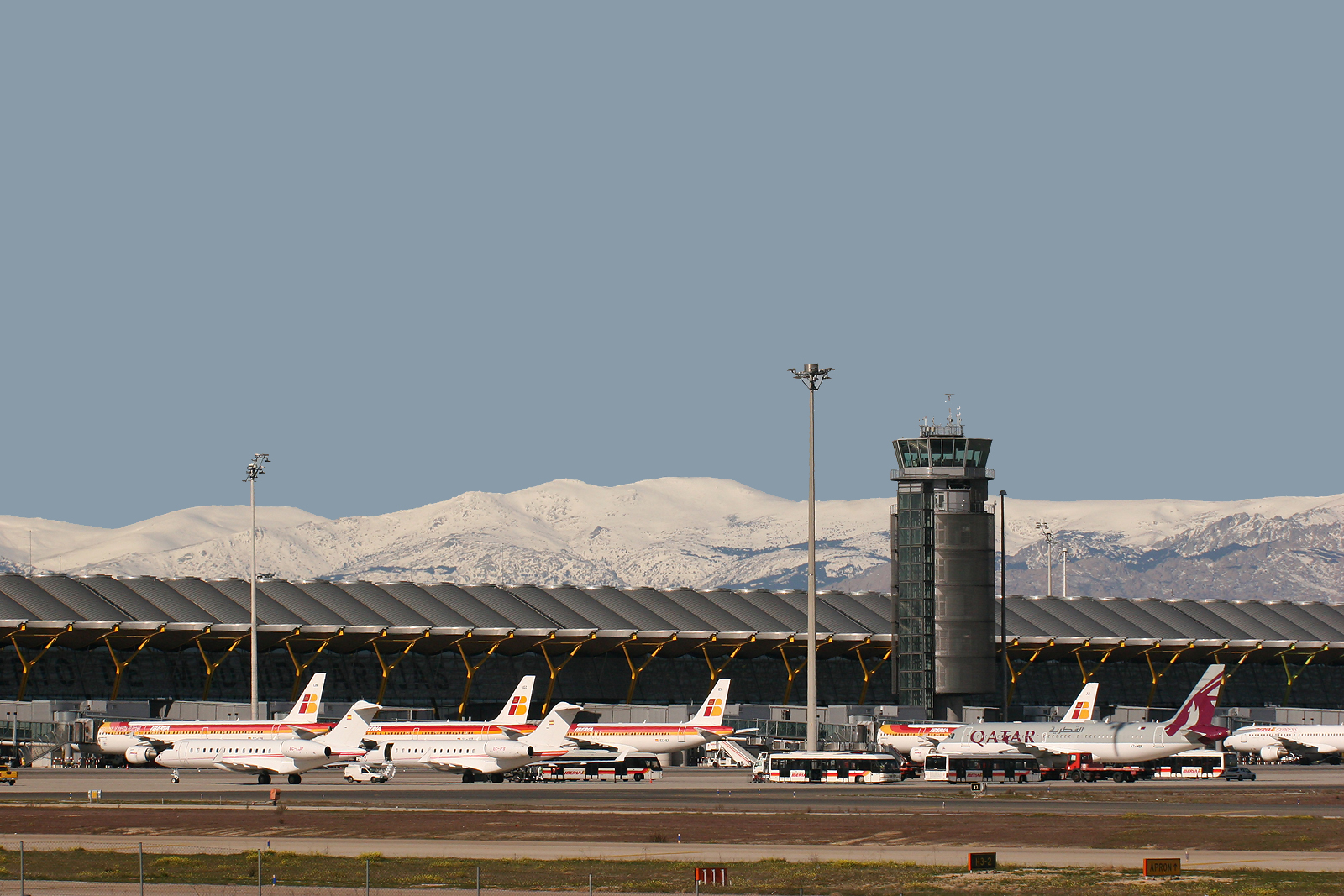 Madrid - Barajas Airport (LEMD/MAD)